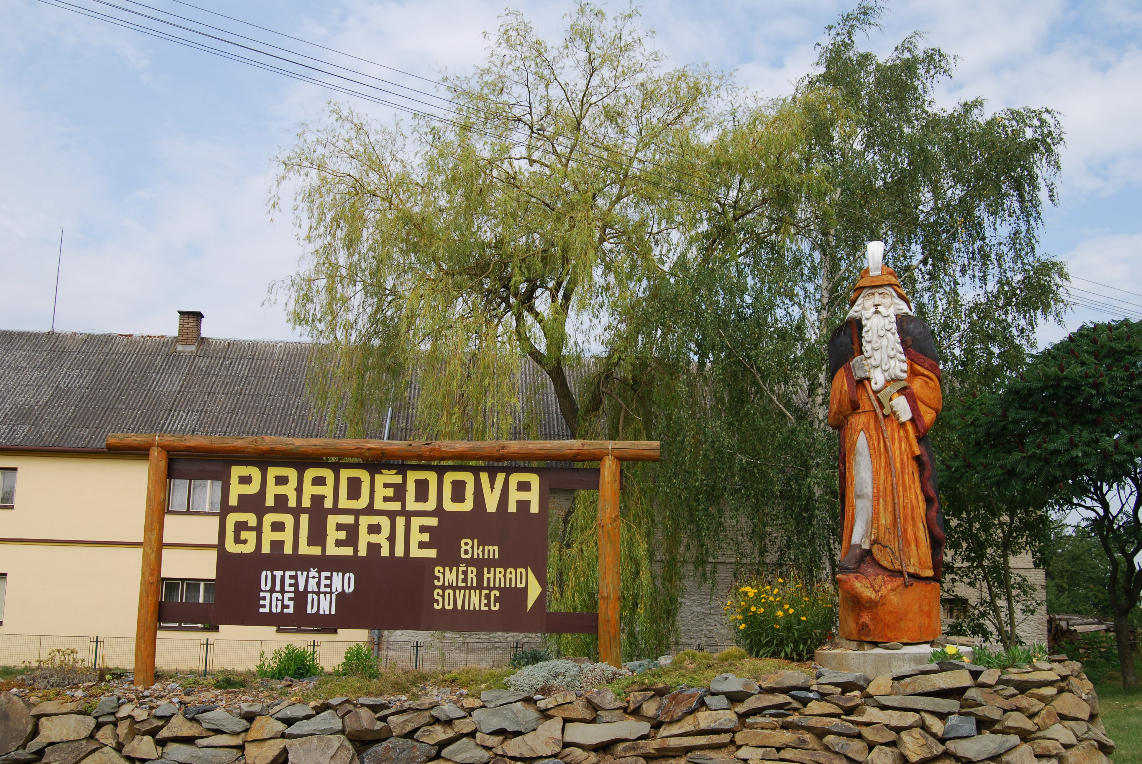 Info tabule na křižovatce v obci. Paseka (okres Olomouc). Česká republika.